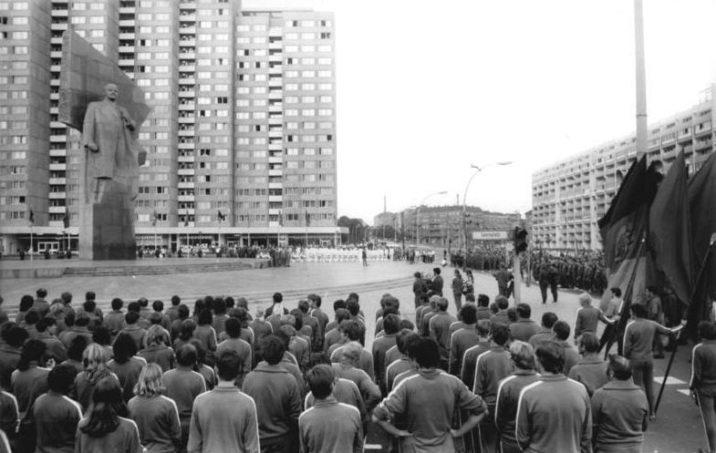 ADN-ZB-Thieme-26.7.72-ma-Berlin: IV.Kinder-und Jugendspartakiade der DDR-Kampfmeeting-Flammenden Protest gegen die Verbrechen des USA-Imperialismus in Vietnam erhoben 1250 Spartakiade-Teilnehmer aus den Bezirken Erfurt, Magdeburg, Potsdam und Suhl auf einem Kampfmeeting auf dem Berliner Lenin-Platz